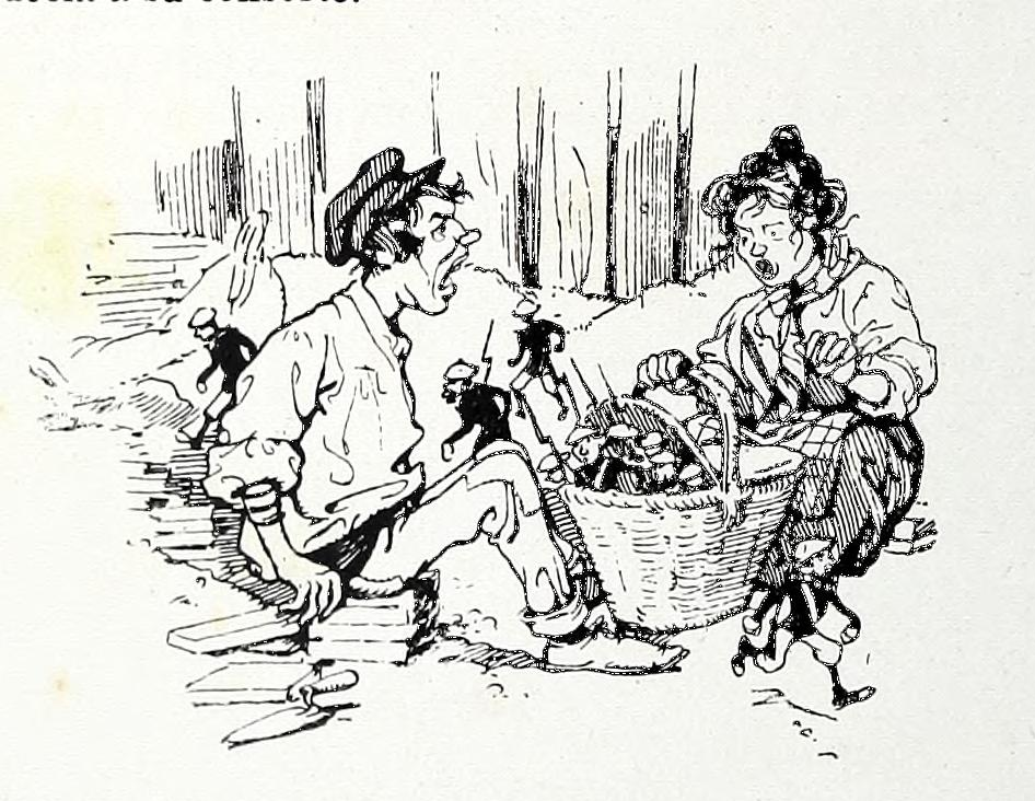 Tela cortada. Con, de, en, por sin, sobre los carlistas.